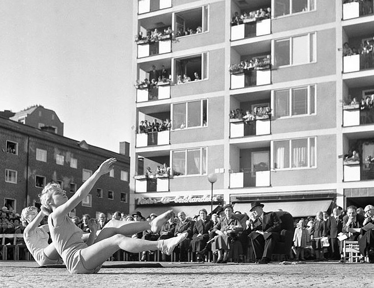 Västertorpsplan. Gymnastikuppvisning inför kungaparet och västertorpsbor i samband med festligheter då skulpturer överlämnas till stadsdelen.